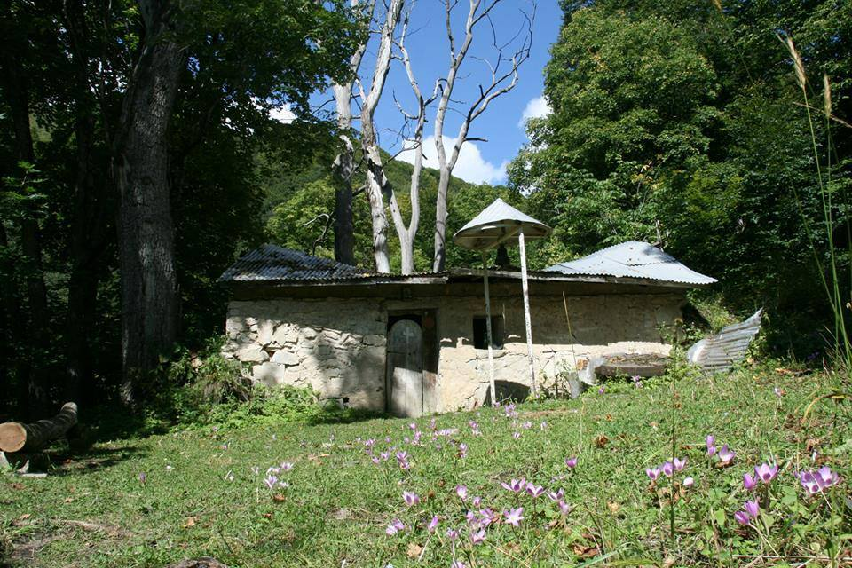 შქმერი. ონის მუნიციპალიტეტი.Shkmeri, Oni Municipality, Georgia.jpg